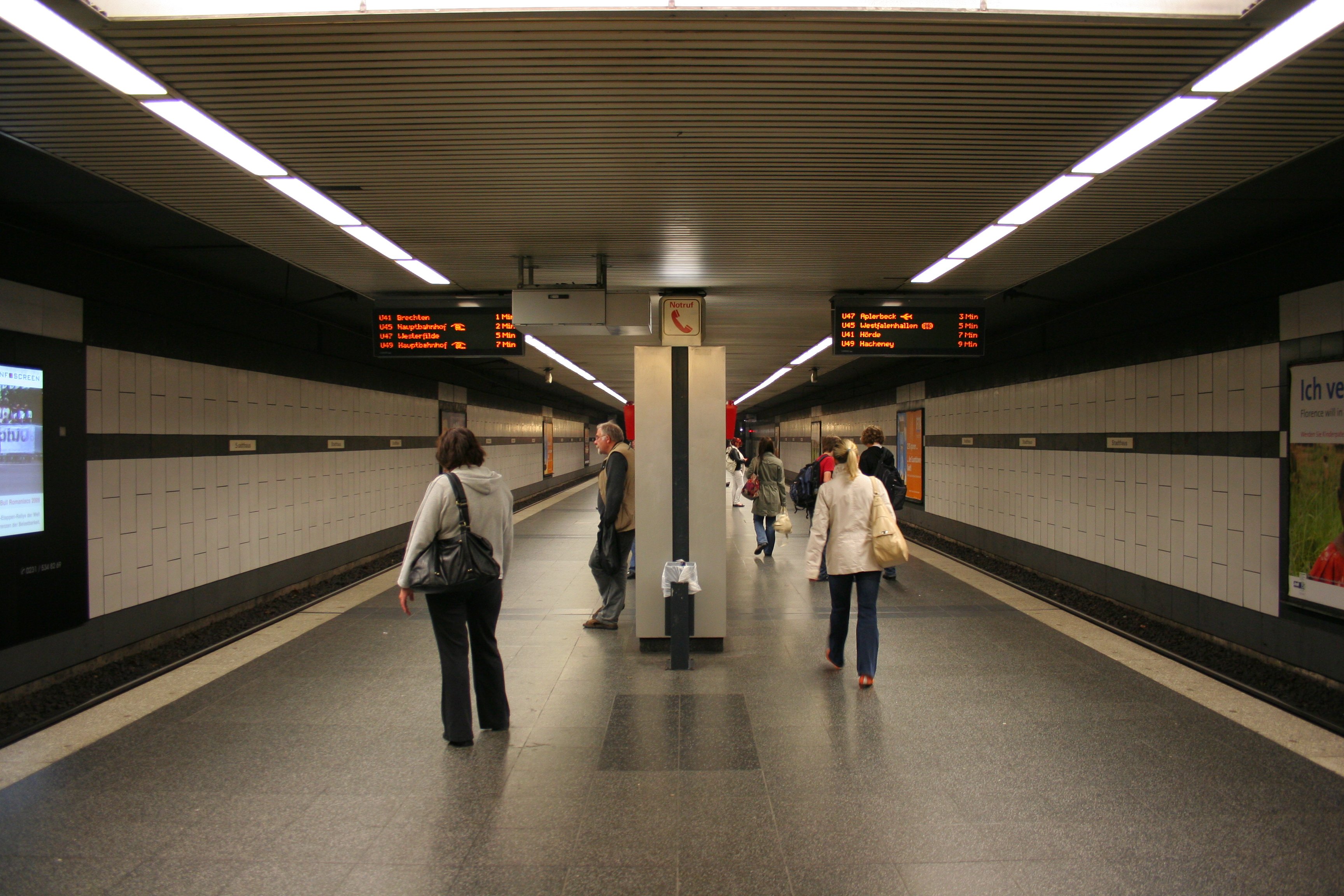 U-Bahnhof Stadthaus in Dortmund. Bahnsteig.